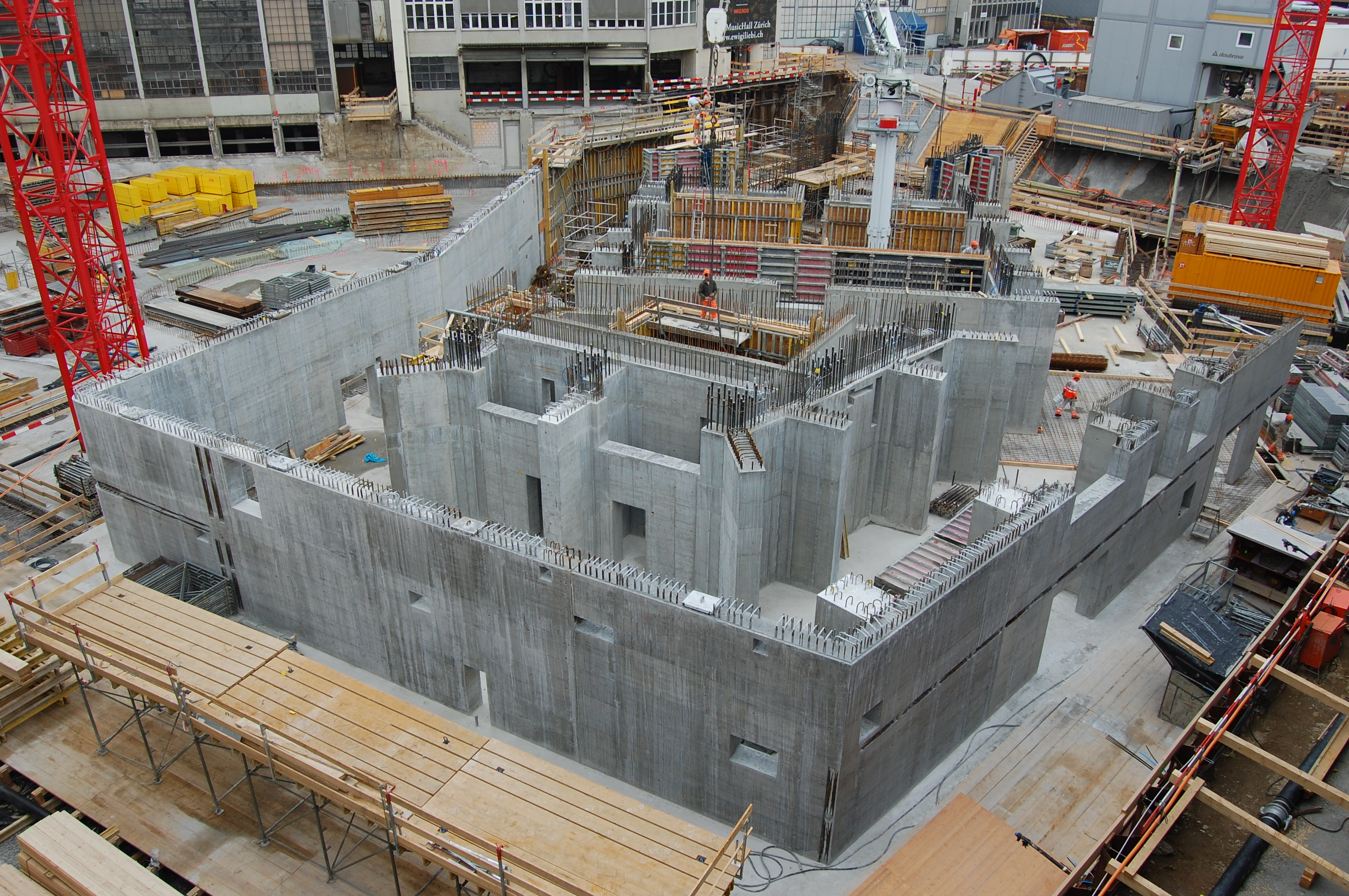 Prime Tower Baustelle im April 2009